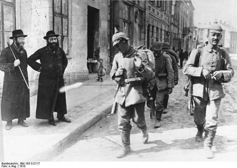 Westgalizien, deutsche Patrouille Scherl: Weltkrieg 1915. Von den siegreichen Kämpfen in Westgalizien. Typische Einwohner von Neu-Sandec beschauen sich eine vorbeiziehende deutsche Patrouille. [I. Weltkrieg, Galizien, Neu-Sandec.- Vorbeimarsch einer deutschen Patrouille an Einwohnern (Juden)] Information added by Wikimedia users.